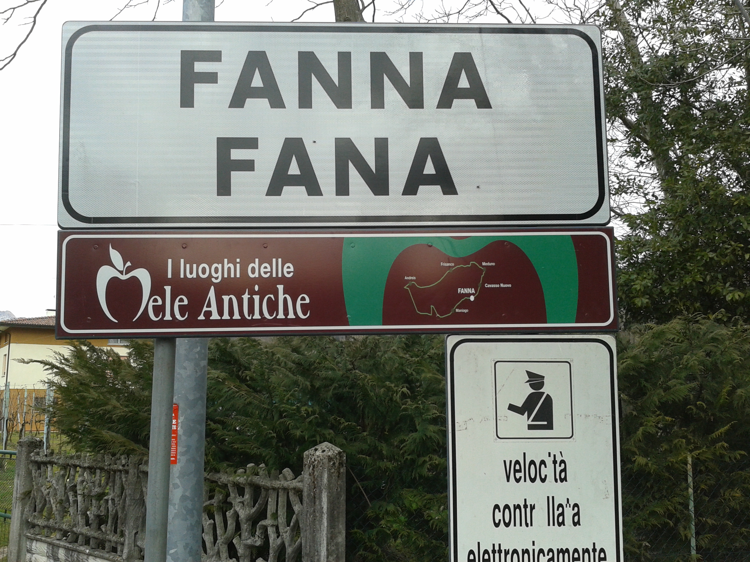 Furlan: Fana - cartel in dople lenghe